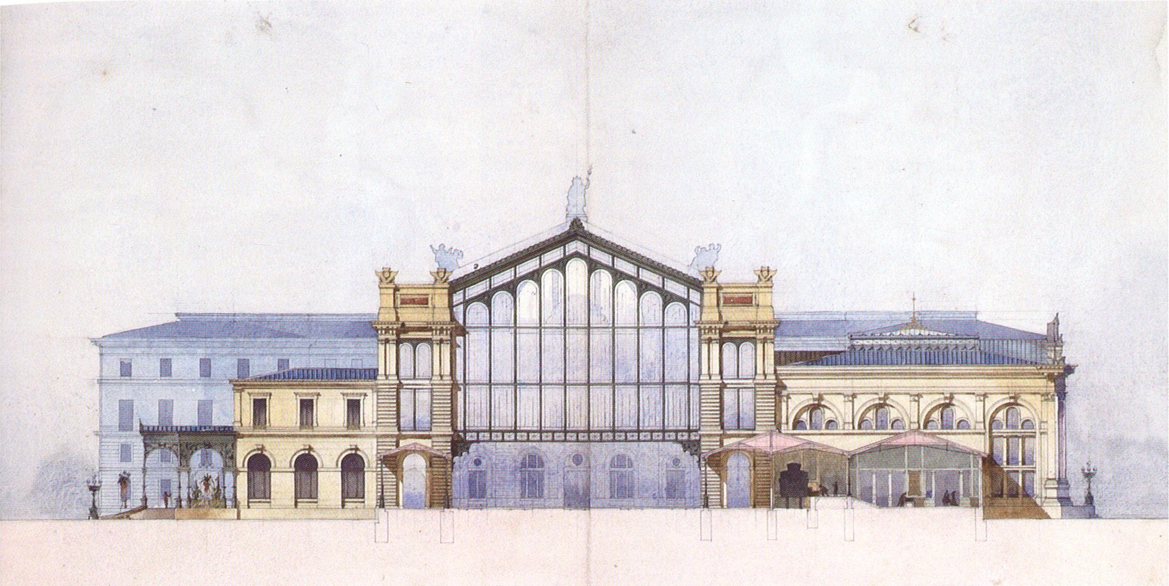 Nordwestbahnhof, Ausfahrt der Bahnhofshalle.